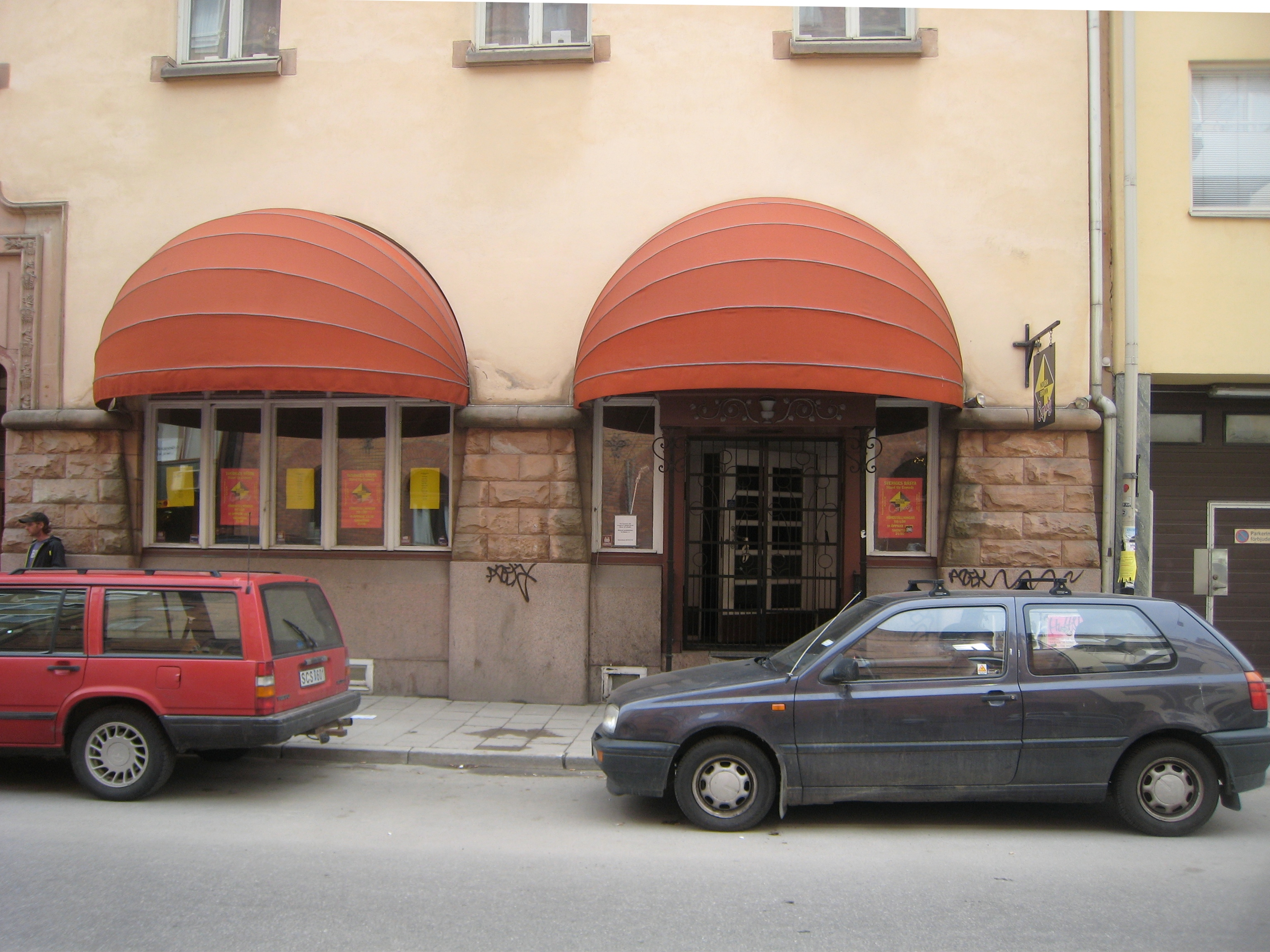 Norra Brunn, Surbrunnsgatan 33, i Vasastaden i Stockholm (1903). Arkitekt: Sam Kjellberg (1868-1939). Huset uppfördes 1903 som kroglokaler eller värdshus för Stockholms utskänkningsaktiebolags räkning, då det öppnade som Norra Brunns värdshus, nu restaurang Norra Brunn.